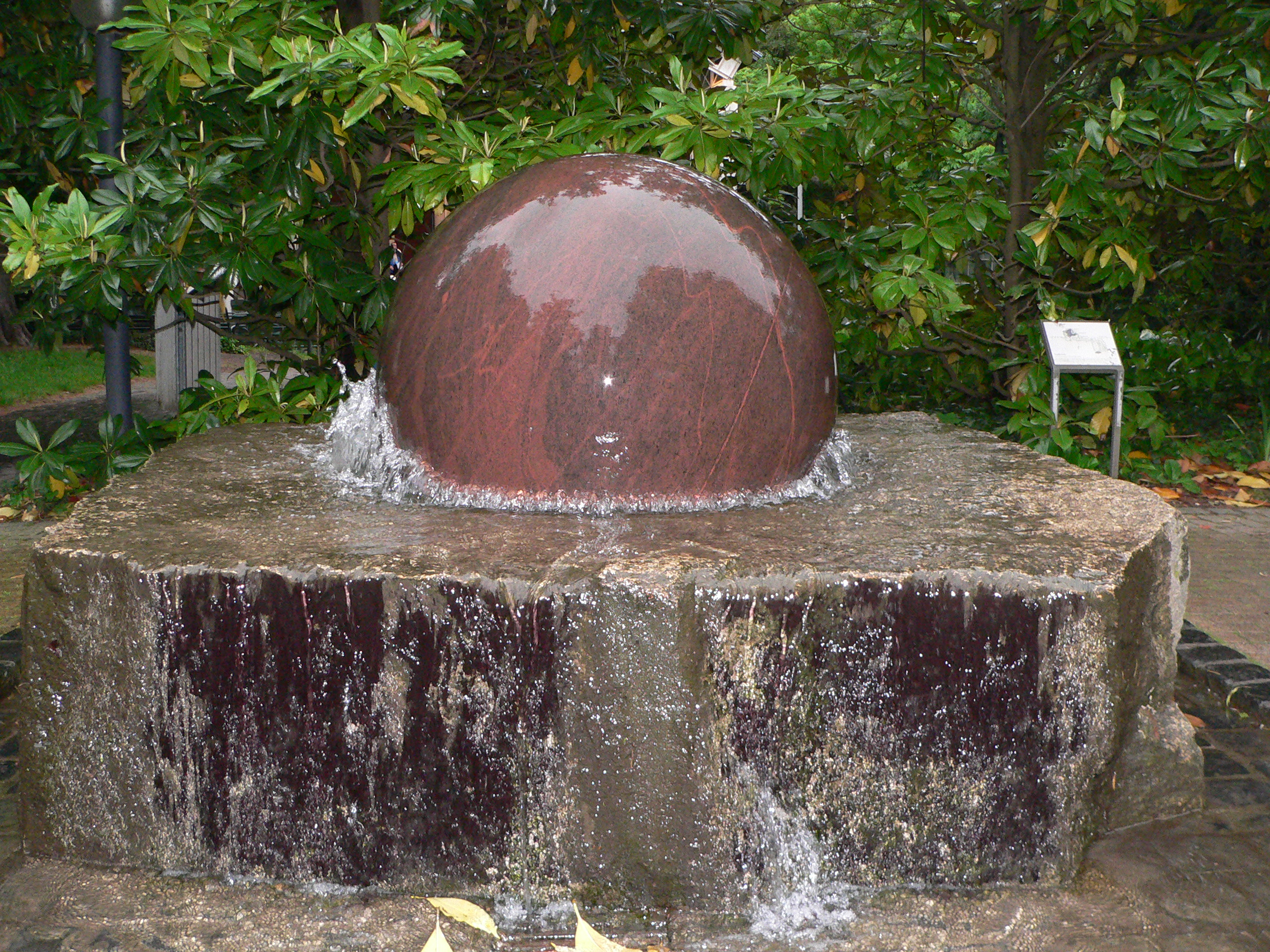 Brunnen mit schwimmender Steinkugel im Palmengarten Frankfurt